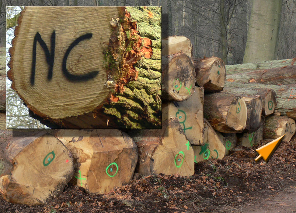 mention NC = "Non cubé" (Photo prise en forêt domaniale de Bonsecours dans le nord de la France)